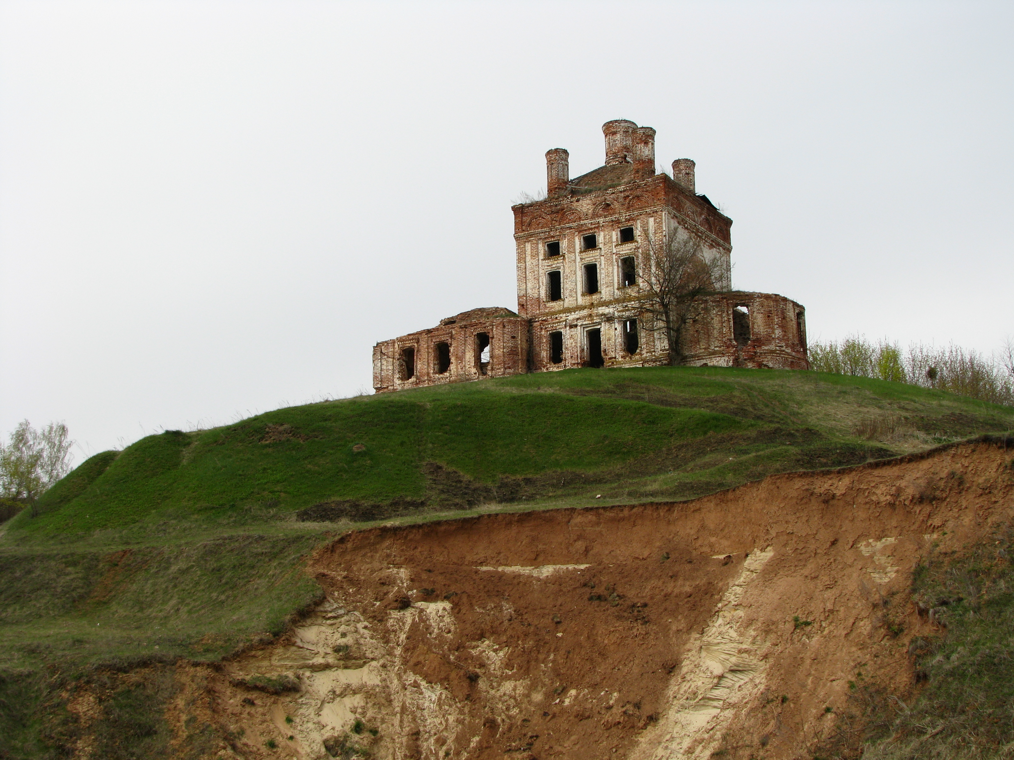 Пантелеево. Ковровский район Владимирской области. Руины церкви Вознесения Господня